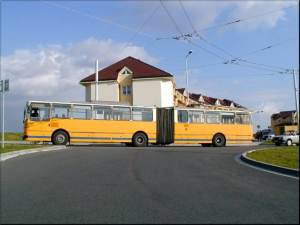 Muzejní S 200Tr v Pardubicích (2005)